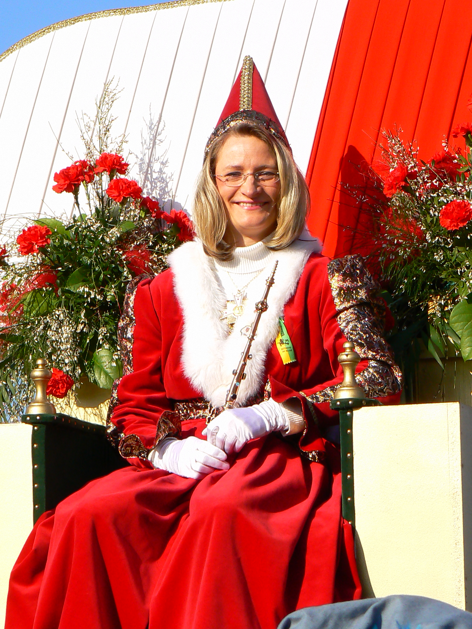 Gräfin Mechthild, Figur der historischen Gruppe der Narrenzunft Rottenburg e. V., Rottenburg am Neckar